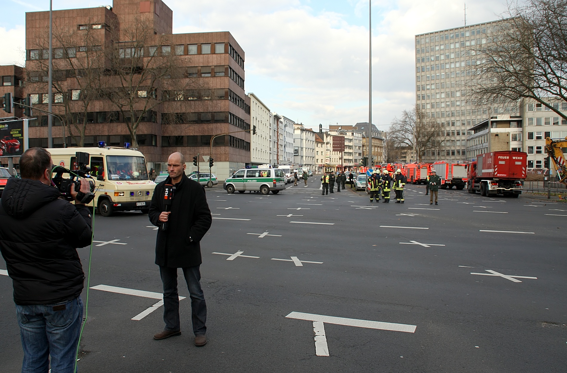 N24-Reporter Steffen Schwarzkopf mit Kameramann in Köln. Reportage vom Einsturz des Historischen Stadtarchivs. Kreuzung Rothgerberbach/Blaubach/Tel-Aviv-Straße (Nord-Süd-Fahrt)